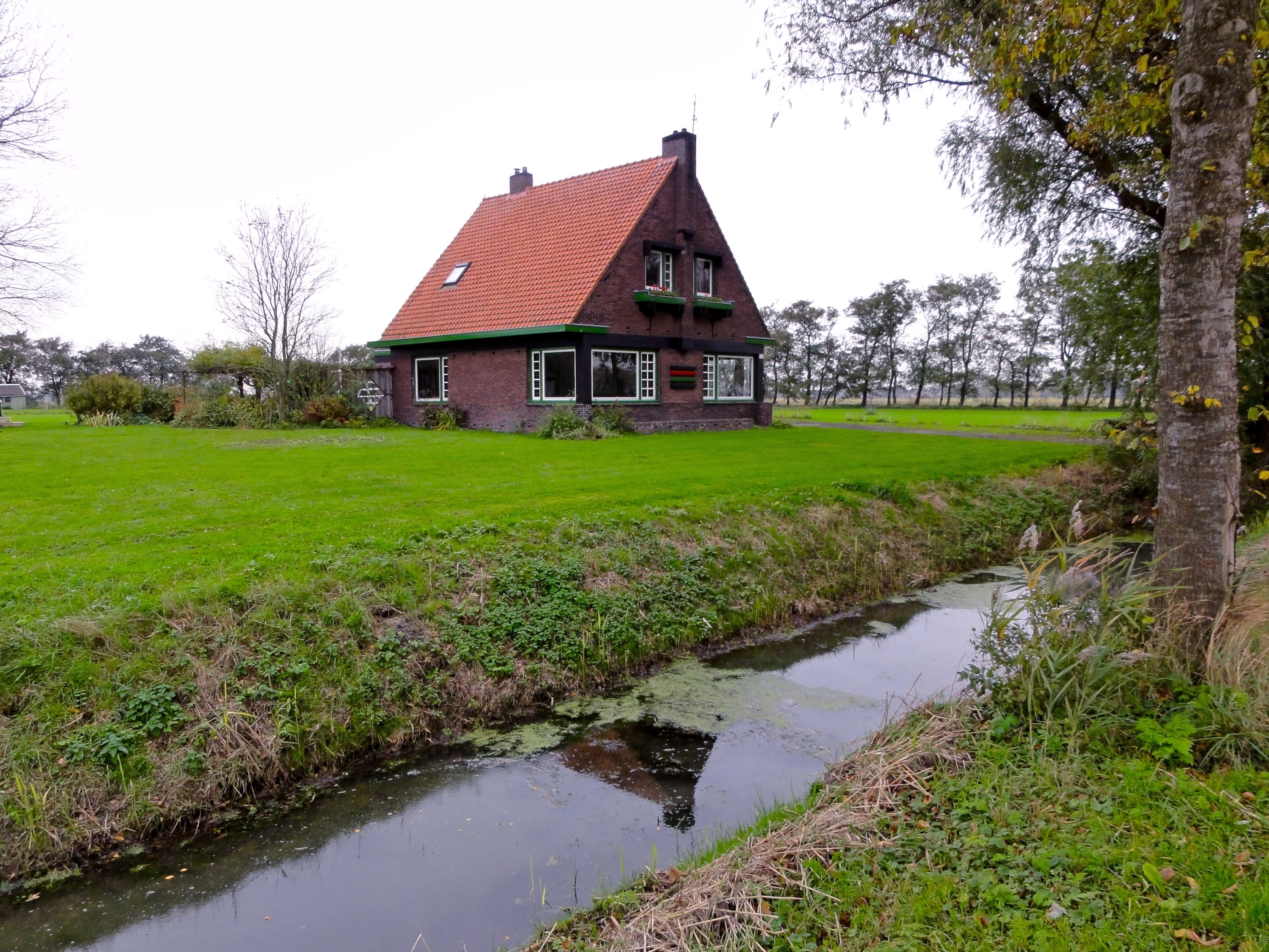 Tuinderij (woonhuis) Hoofdstraat 23 te Niekerk (de Marne)